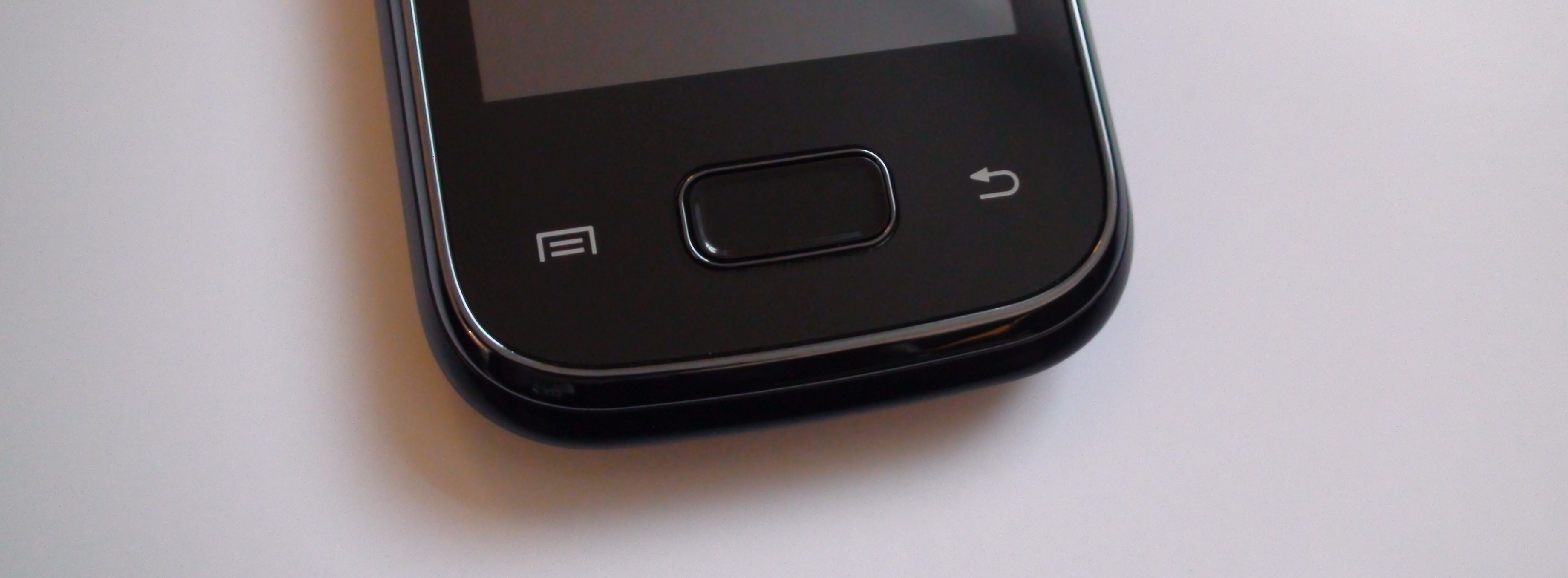 Fotografie předních tlačítek telefonu Samsung Galaxy Pocket.